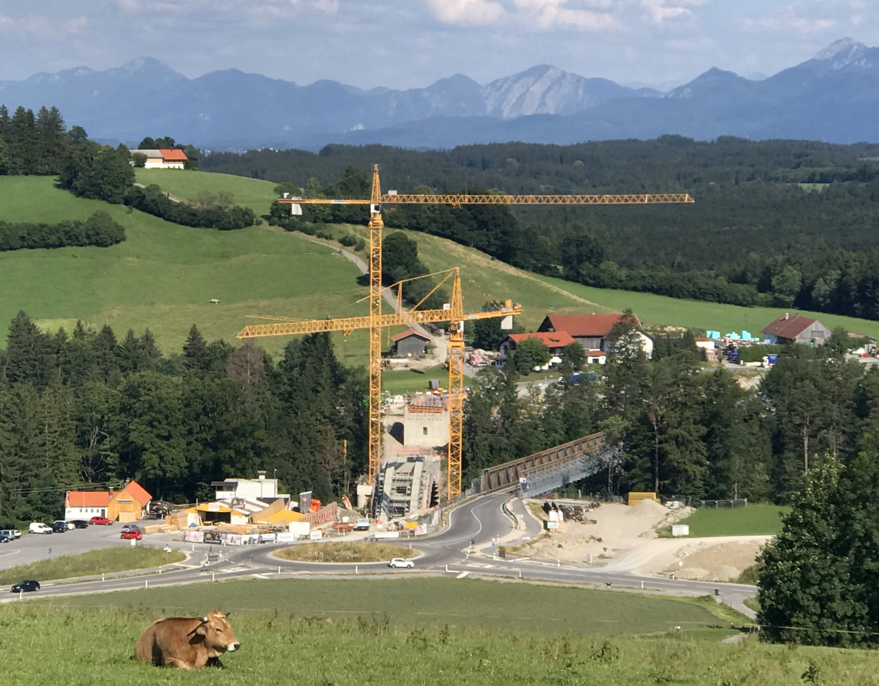 Echelsbacher Brücke während der Erneuerungsarbeiten Juli 2019 (in der Bildmitte), Rechtsdavon die Behelfsbrücke, über die der Verkehr während der Brückenerneuerung geleitet wird. Aufnahmestandpunkt nahe der Schönegger Käse-Alm.